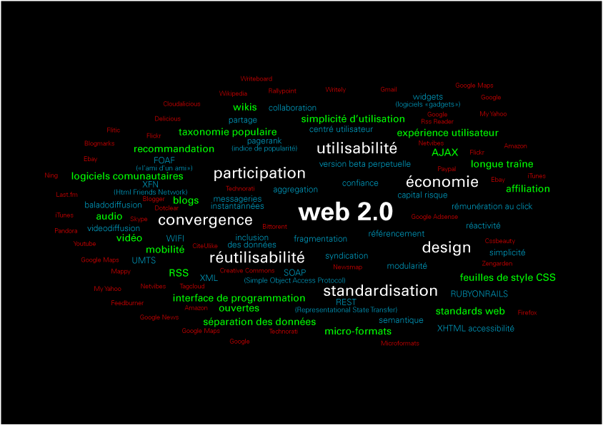 Carte Française du web 2.0